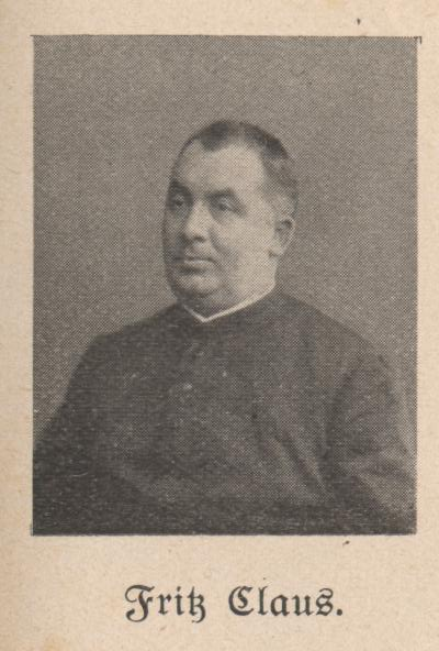 Fritz Claus, deutscher Priester und pfälzer Heimatschriftsteller